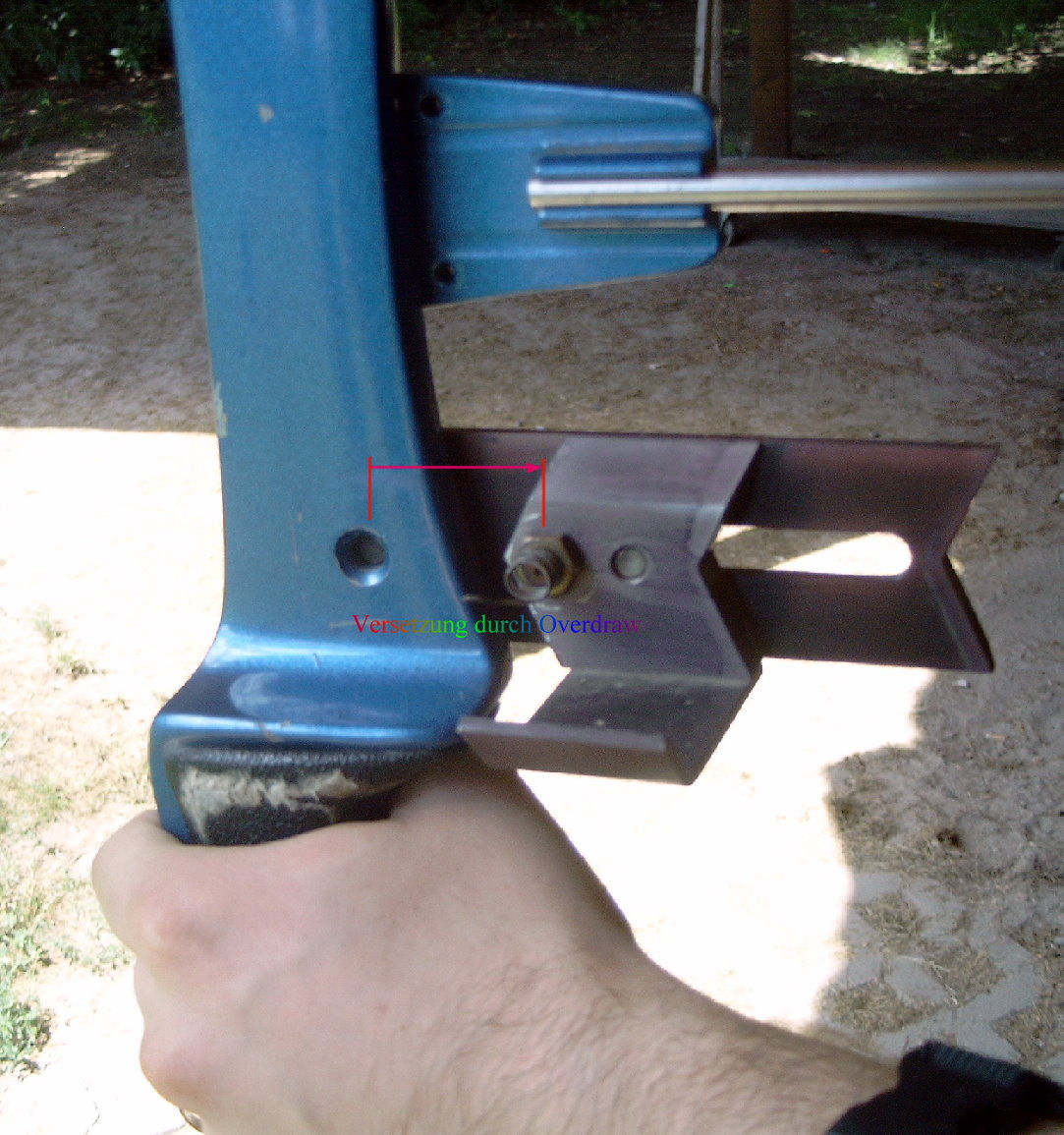 Overdraw